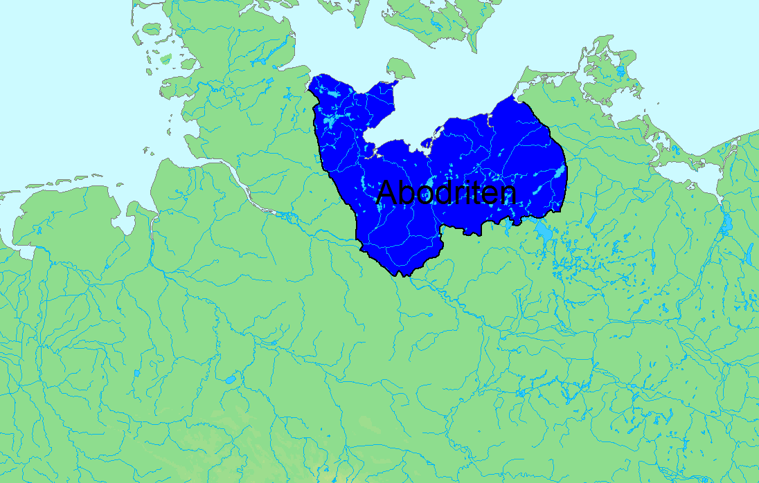 Siedlungsgebiet der Abodriten.Grenzziehung angelehnt an: Michael Müller-Wille: Zwischen Starigard/Oldenburg und Novgorod. Beiträge zur Archäologie west- und ostslawischer Gebiete im frühen Mittelalter. (= Studien zur Siedlungsgeschichte und Archäologie der Ostseegebiete. Bd. 10), Wachholtz, Neumünster 2011, ISBN 978-3-529-01399-7. S. 46 ff.Topographische Grundkarte (Küstenlinien, Flüsse) von demis (gemeinfrei [1])